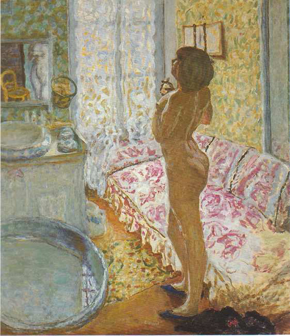 Nu à contre-jour